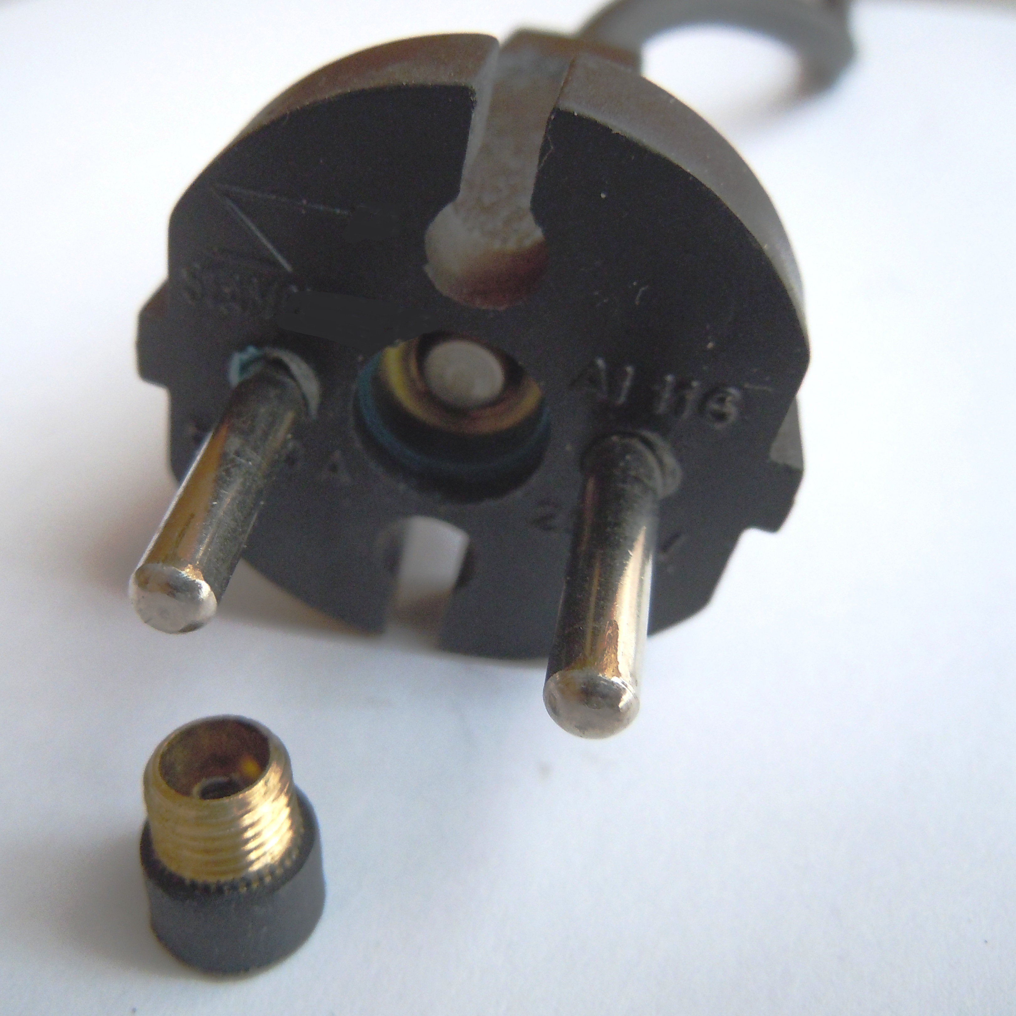 spina elettrica di tipo GOST 7396 (russa) con fusibile da 10A integrato al centro, il quale è visibile grazie al tappo svitato.